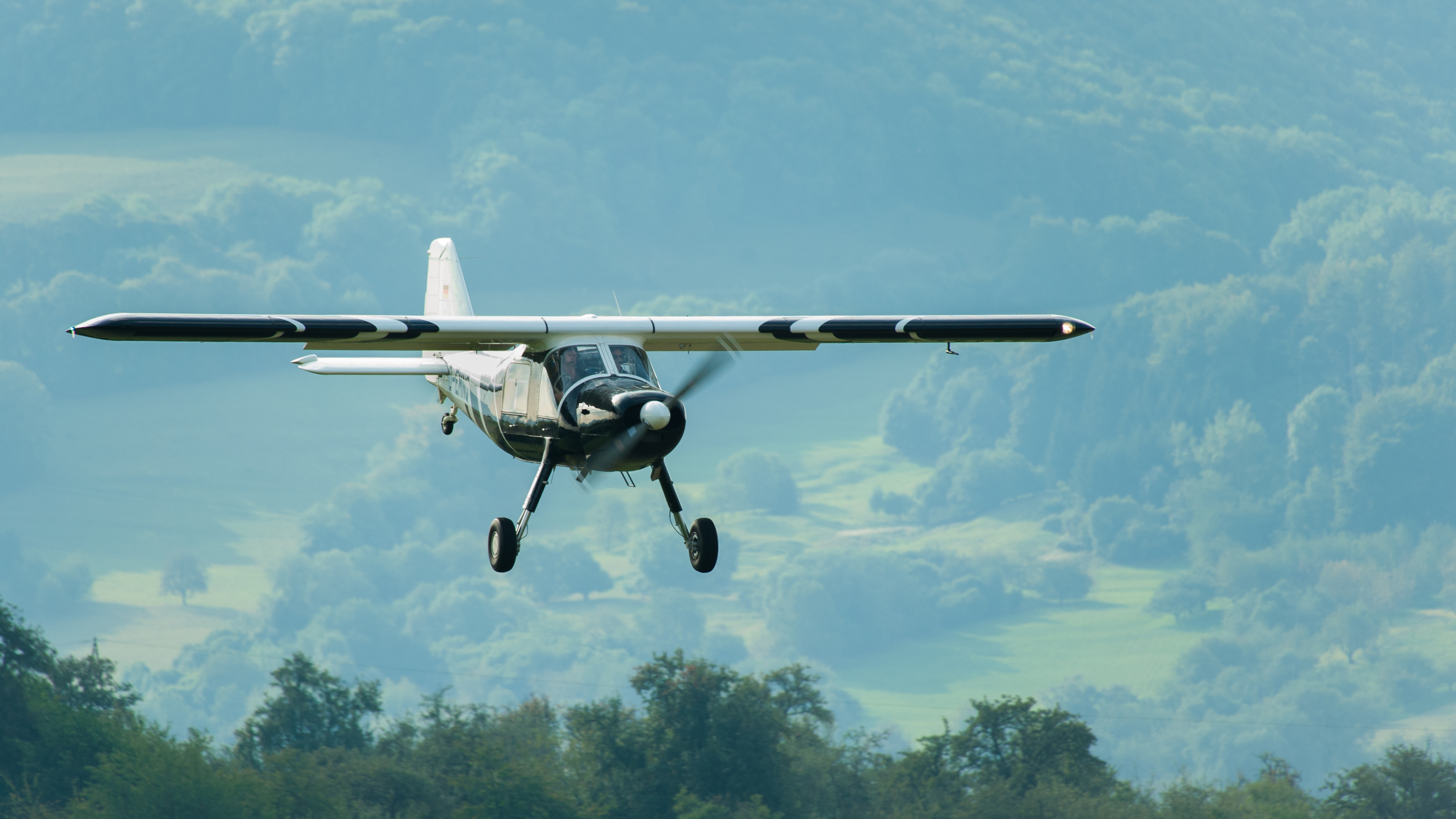 Dieses Foto wurde beim Oldtimer Fliegertreffen, 2013 am Flugfeld Hahnweide bei Kirchheim unter Teck aufgenommen. Es zeigt eine Dornier Do-27 B1 im Landeanflug